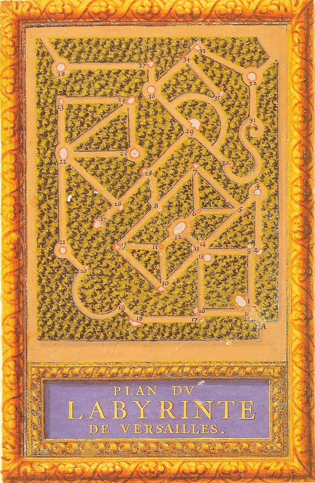 Plan du labyrinthe de Versailles (détruit en 1775) - Gravure de Sébastien Le Clerc, musée du Petit-Palis, Paris - Les différents statues portaient des plaques où étaient inscrites des devises et maximes tirées des fables d'Esope et rédigées par Benserade. Charles Perrault publie en 1677 Labyrinthe de Versailles illustré de gravures de Le Clerc, où il décrit le parcours et les différents sujet des statues.